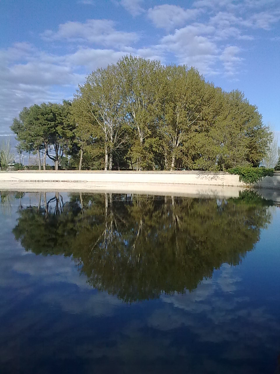 Basses d'Alpicat 29/03/09